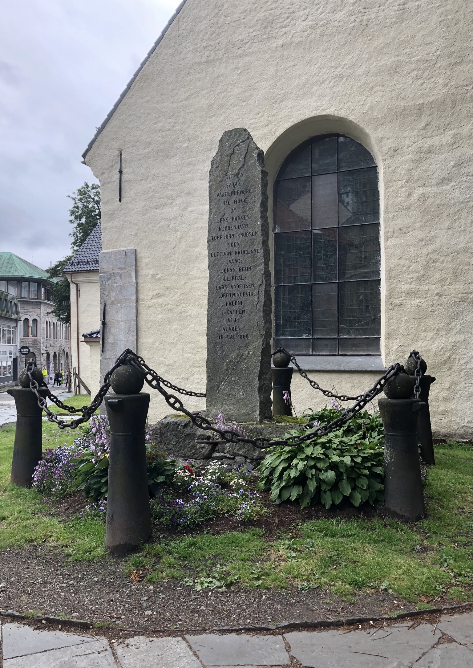 Marienkirche in Bergen, Rückseite